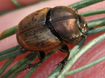 Onthophagus coenobita (Weibchen) am 23.9.2017 in der Schwetzinger Hardt